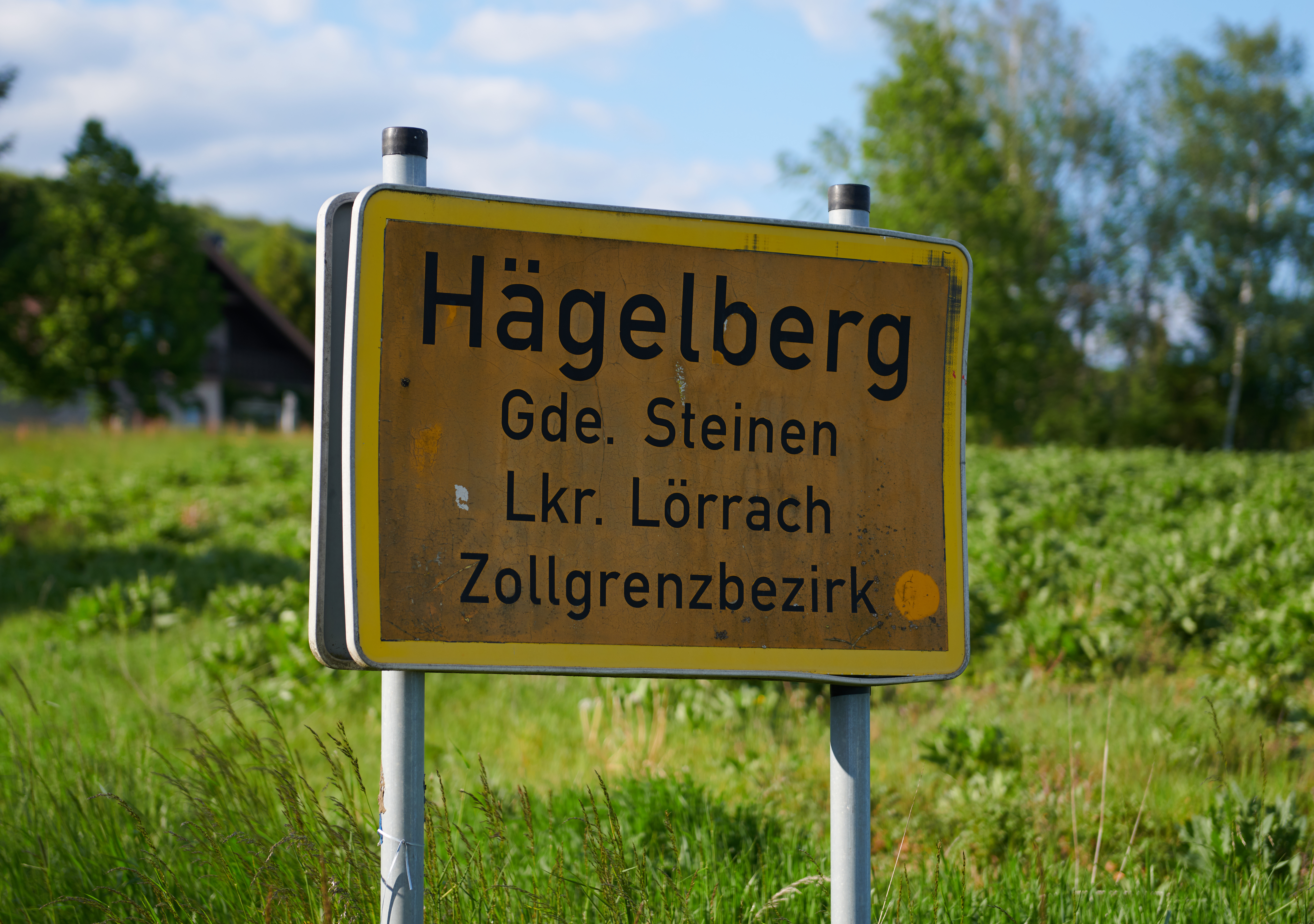 Hägelberg: Ortseingangsschild